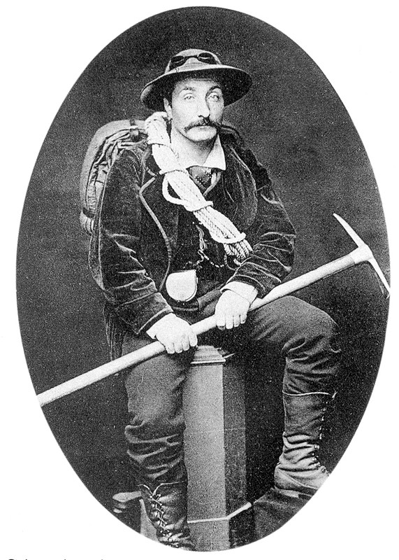 Paul Guillemin (1847-1928)